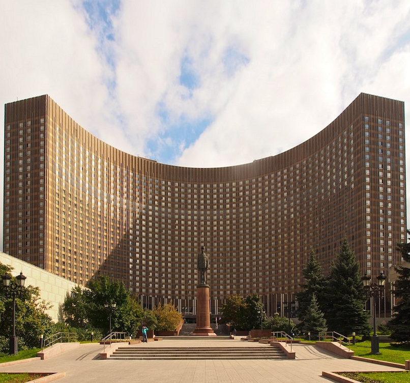 Cosmos Hotel